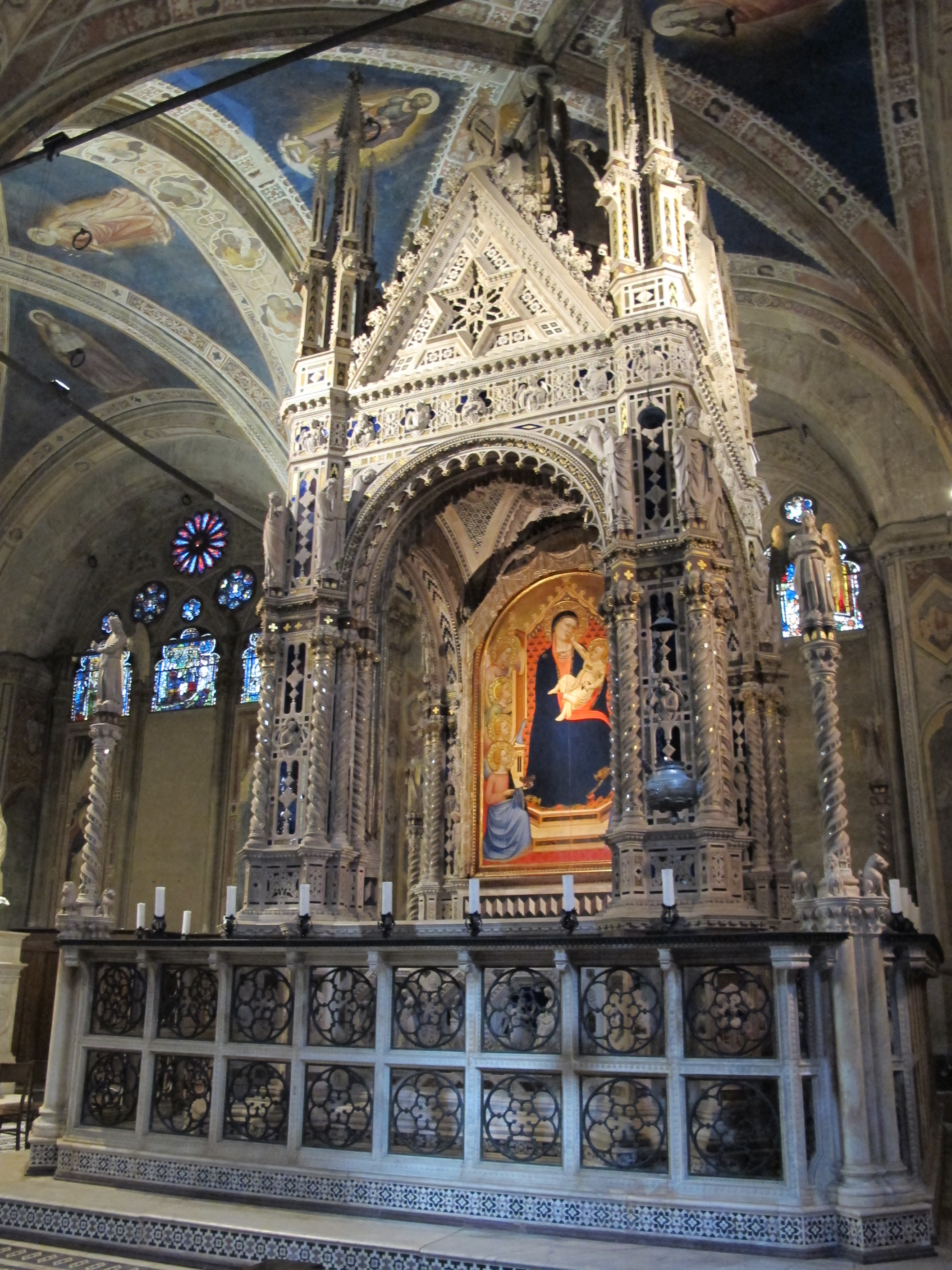 Chiesa di Orsanmichele - MIBAC This is a photo of a monument which is part of cultural heritage of Italy.